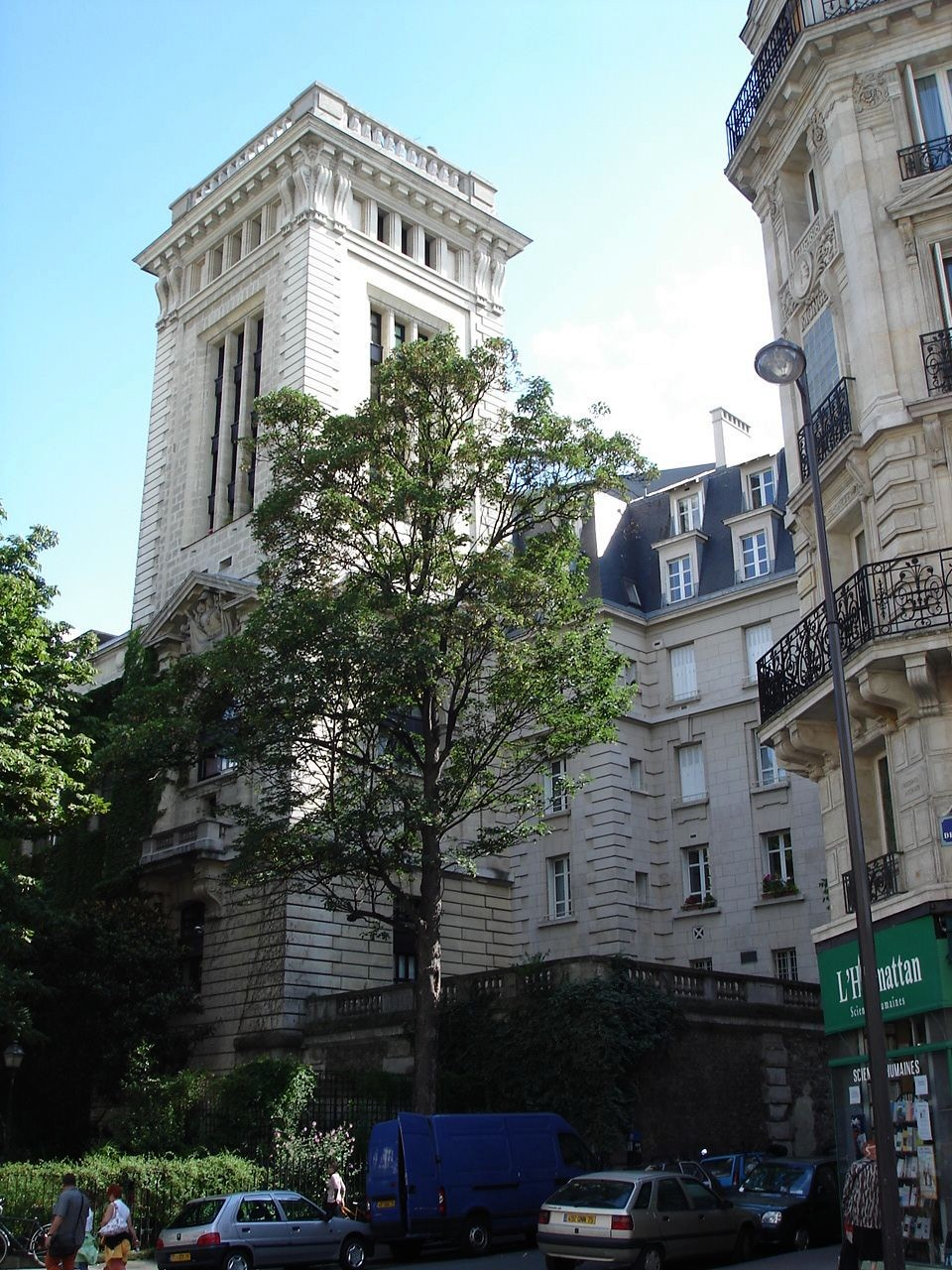 Ministère de la Recherche Scientifique (anciennement École Polytechnique, vue de la Rue des Écoles